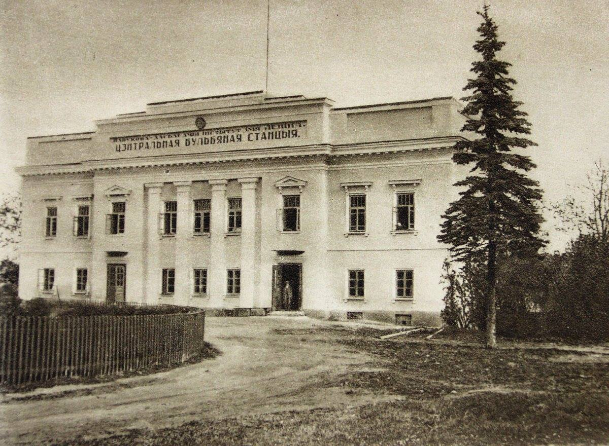 Беларуская (тарашкевіца): Менск (Miensk), Сьляпянка Вялікая (Ślapanka Vialikaja). Палац Ваньковічаў (Vańkovič)